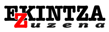 Ekintza Zuzena